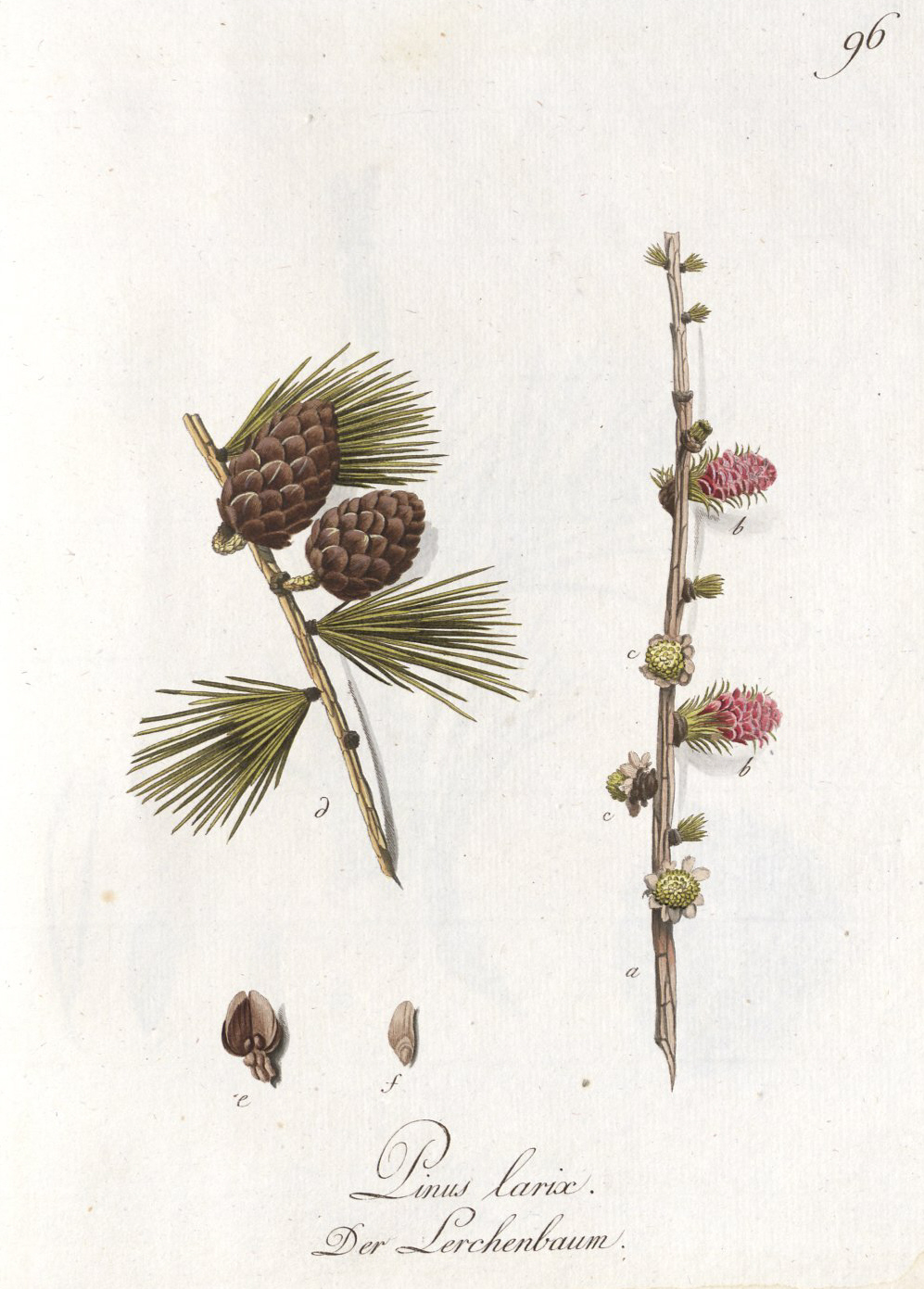 Abbildung Der Hundert Deutschen Wilden Holz-Arten Nach Dem Nummern-Verzeichnis Im Forst-Handbuch Von F. A. L. Von Burgsdorf; Tafel: Der Lerchenbaum (Pinus larix) Erklärung